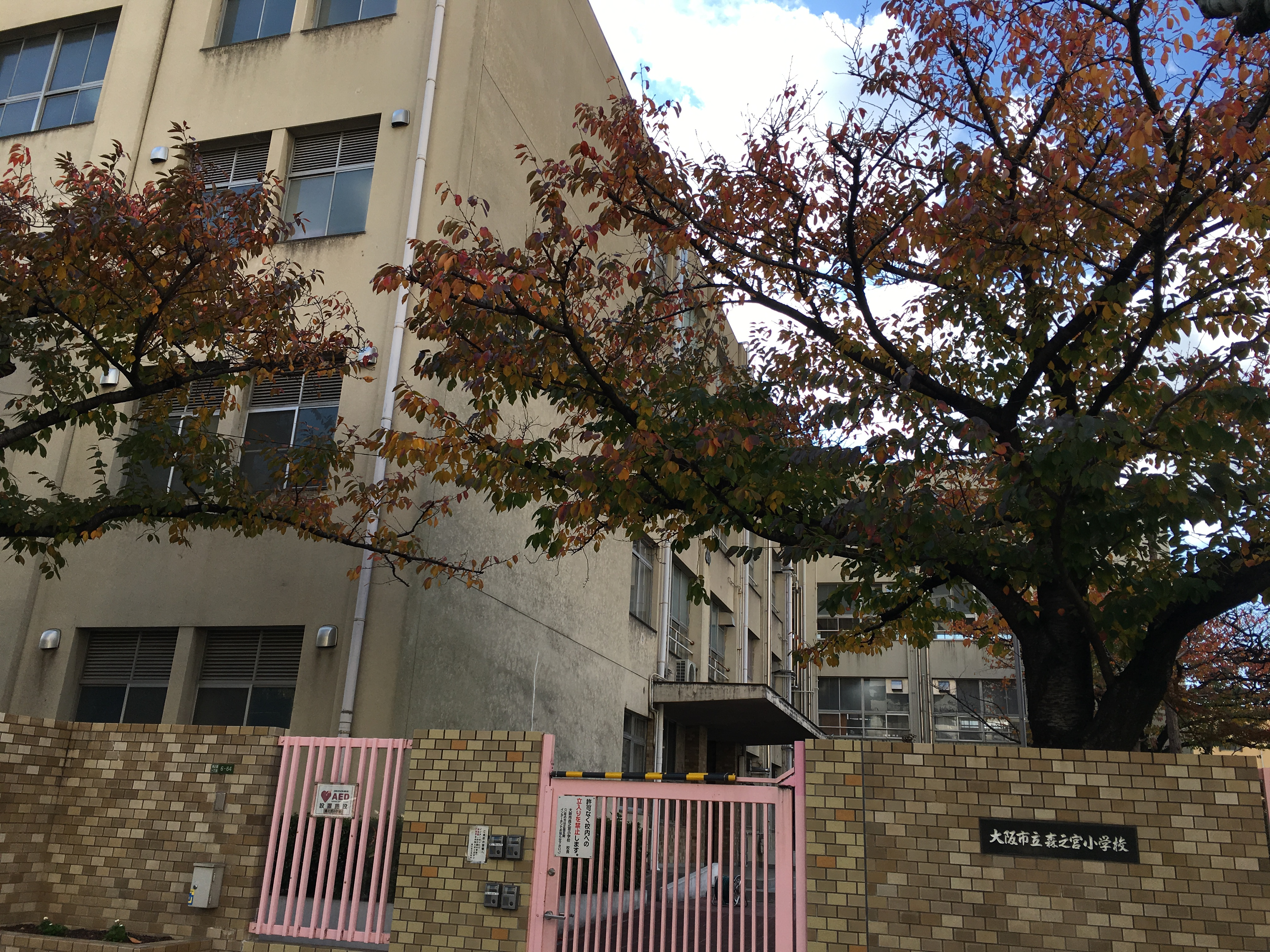 大阪市立森之宮小学校